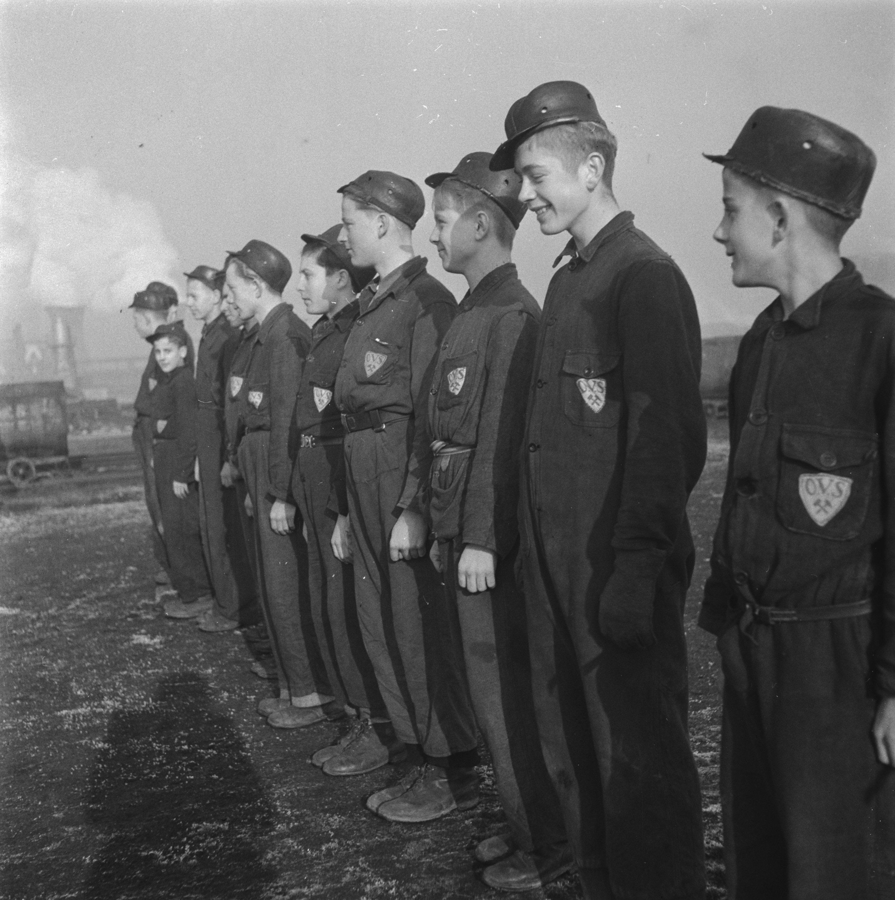 Collectie / Archief : Fotocollectie Anefo Reportage / Serie : Kolenmijnen Limburg Beschrijving : Kolenmijnen Limburg Datum : 21 november 1945 Locatie : Limburg Trefwoorden : mijnbouw, mijnen, mijnwerkers Fotograaf : Blazer, Carel / Anefo Auteursrechthebbende : Nationaal Archief Materiaalsoort : Negatief (zwart/wit) Nummer archiefinventaris : bekijk toegang 2.24.01.03 Bestanddeelnummer : 901-1040